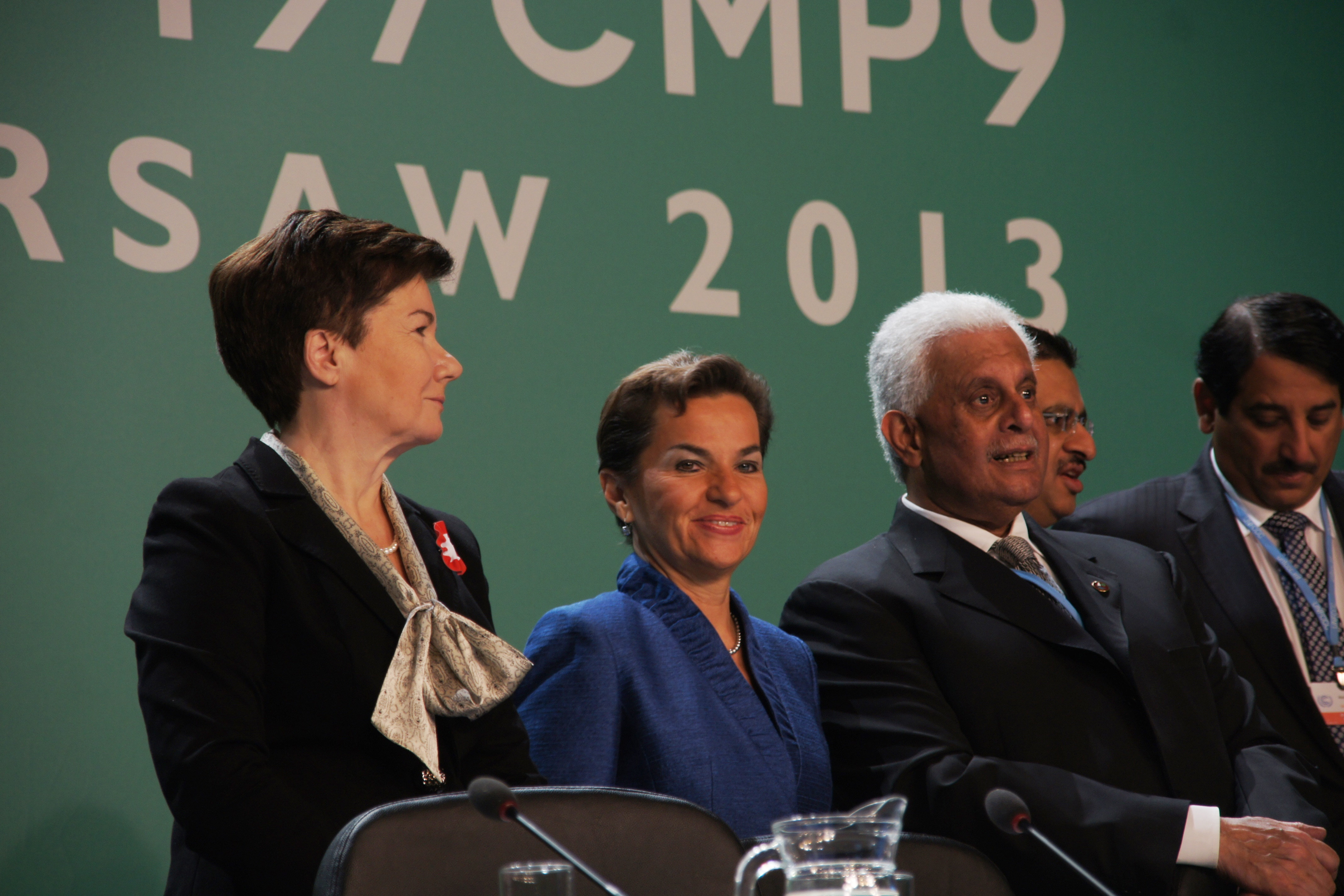 COP19 at National Stadium